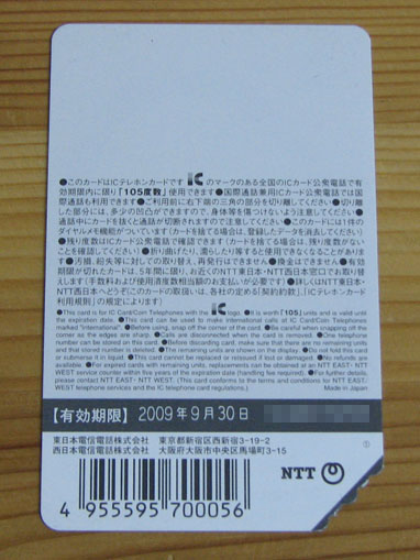 ICテレホンカード（裏面） 一部加工 撮影者・投稿者：e3uematsu